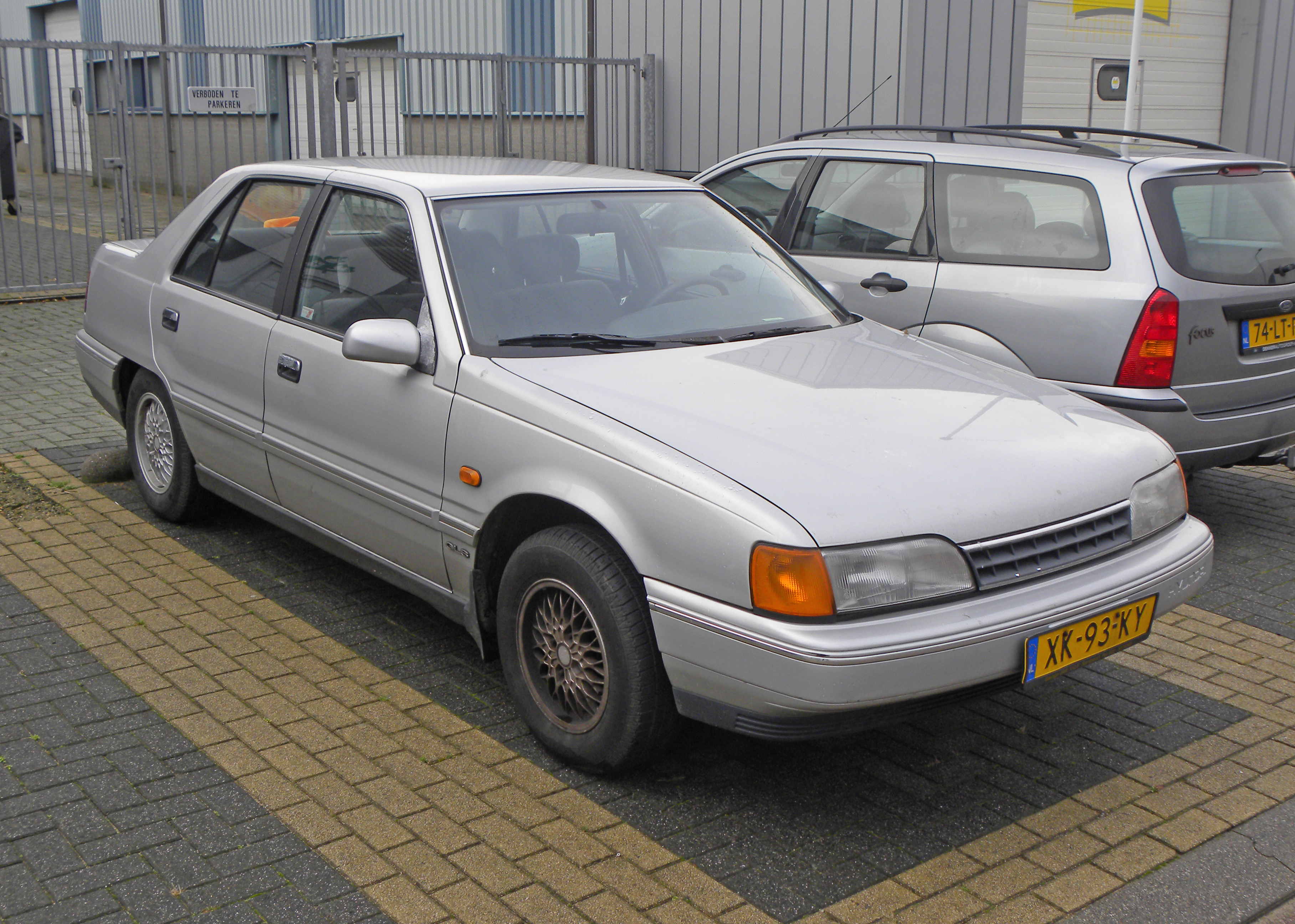 1989 Hyunday Sonata 2.4 GLS